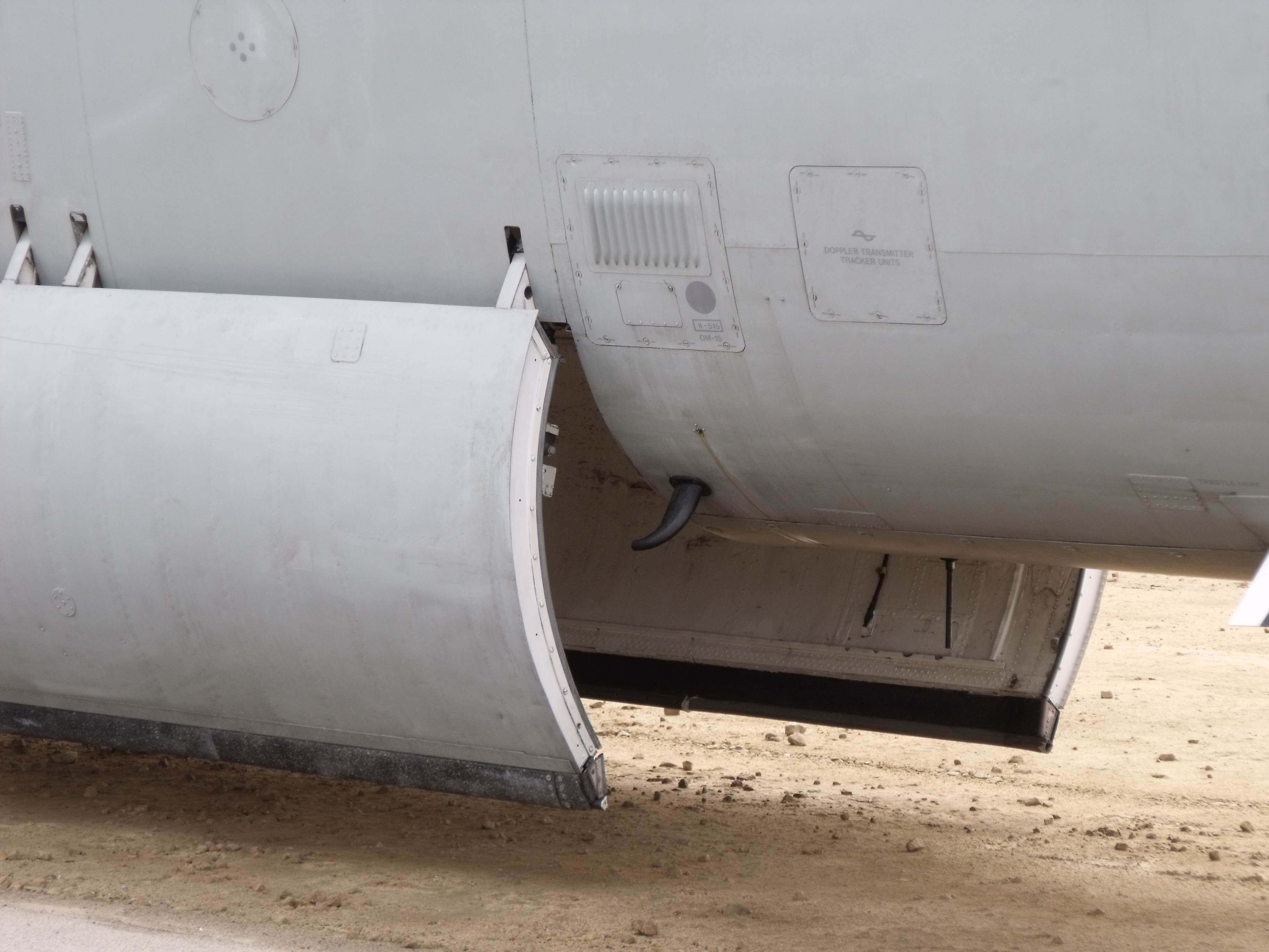 Taken 5/6/2010